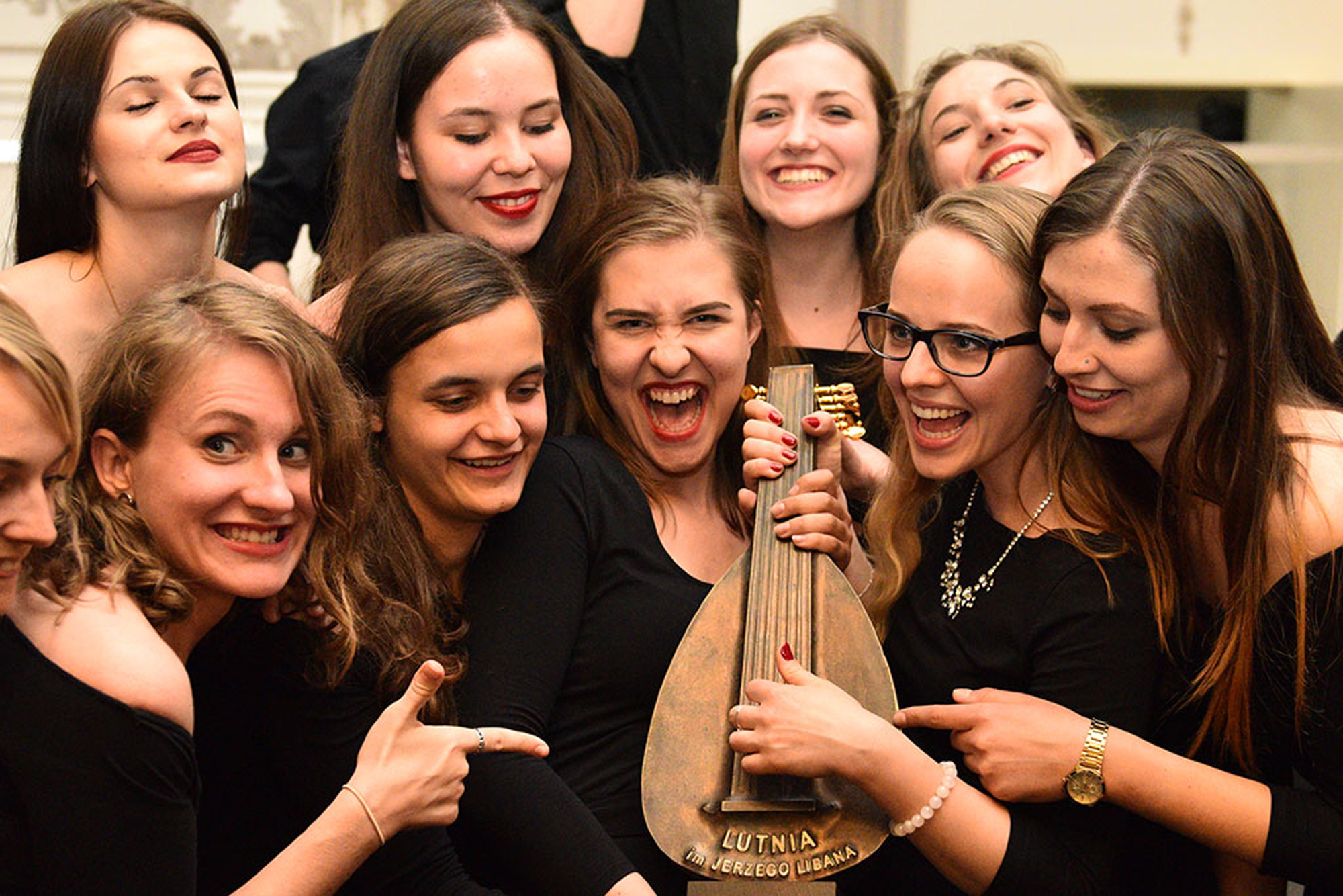 Legnica Cantat 49, rok 2018. Nagroda główna, Lutnia im. Jerzego Libana w rękach zwycięzcy konkursu – Chóru Kameralnego Akademii Muzycznej w Poznaniu (dyr. Marek Gandecki). Lutnia przeszła na własność chóru.